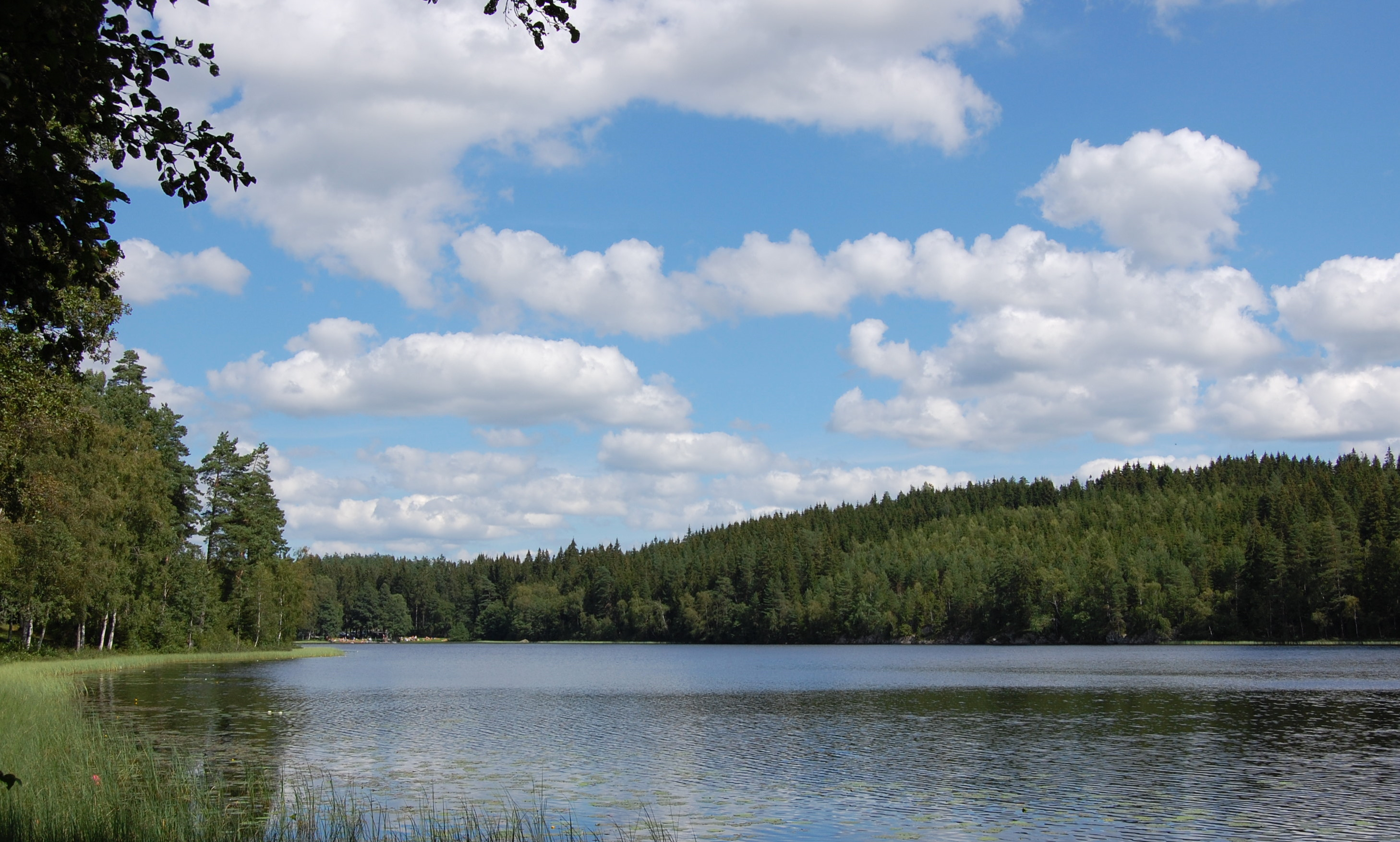 Blick vom Südufer des Skärsjön nach Norden